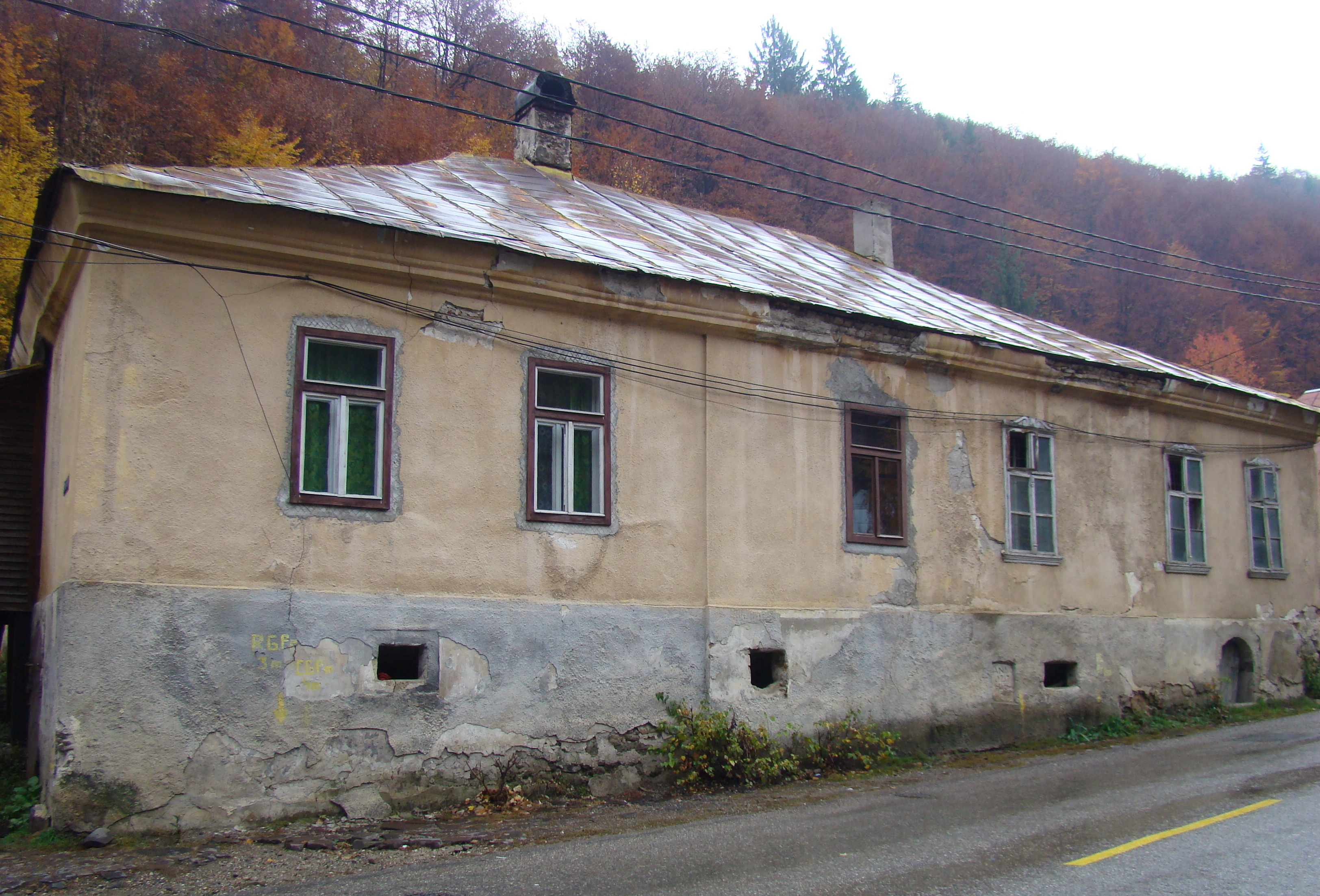 Ansamblul de locuințe și administrația minei Cavnic (Cartier Handal), Str. Eliberării 39, 41, 43, 45